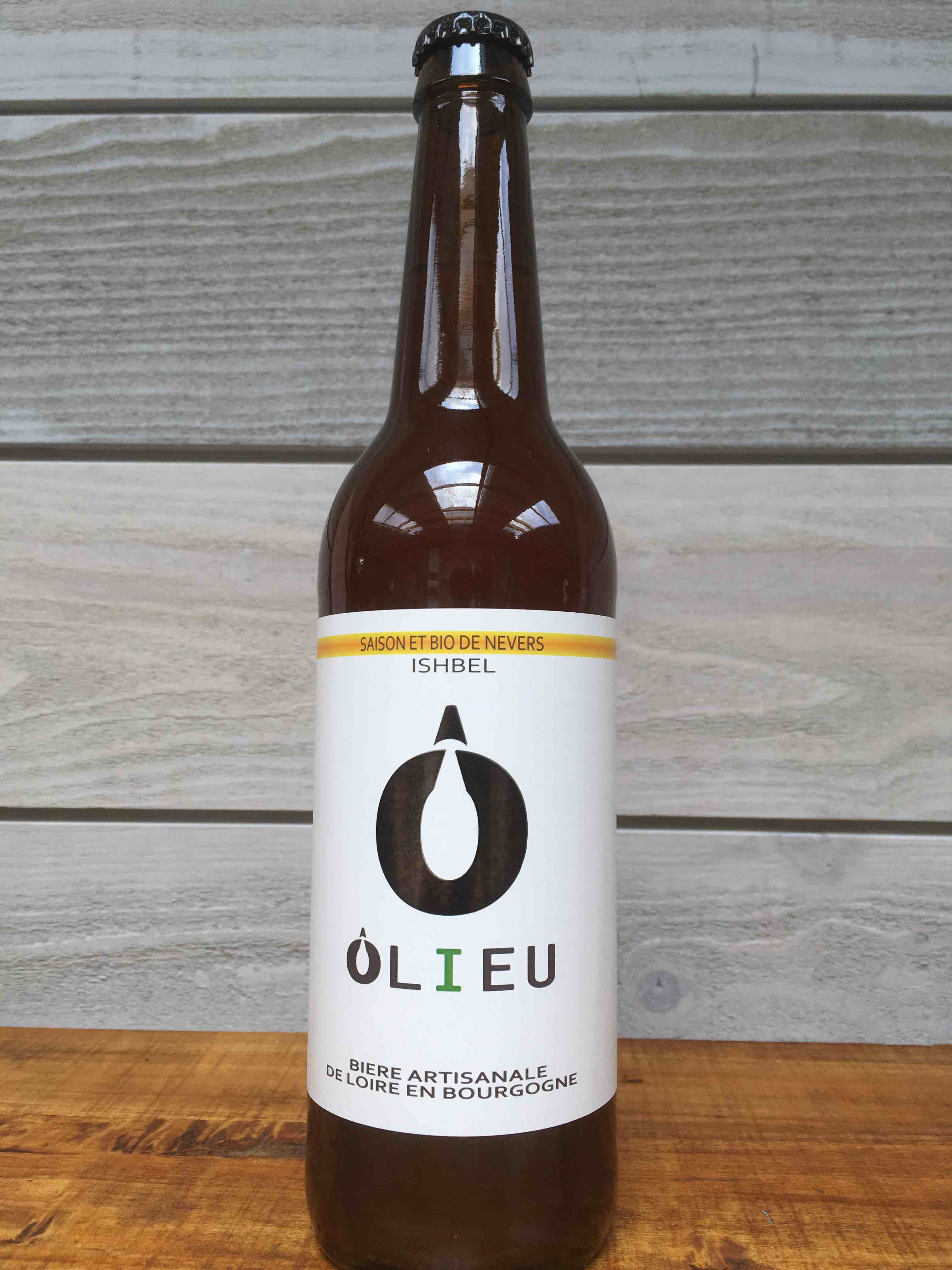 bouteille 50cl et 25cl